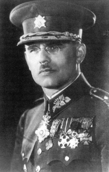 Generál Vojtěch Luža, rodák z Uherského Brodu, hrdina protinacistického odboje